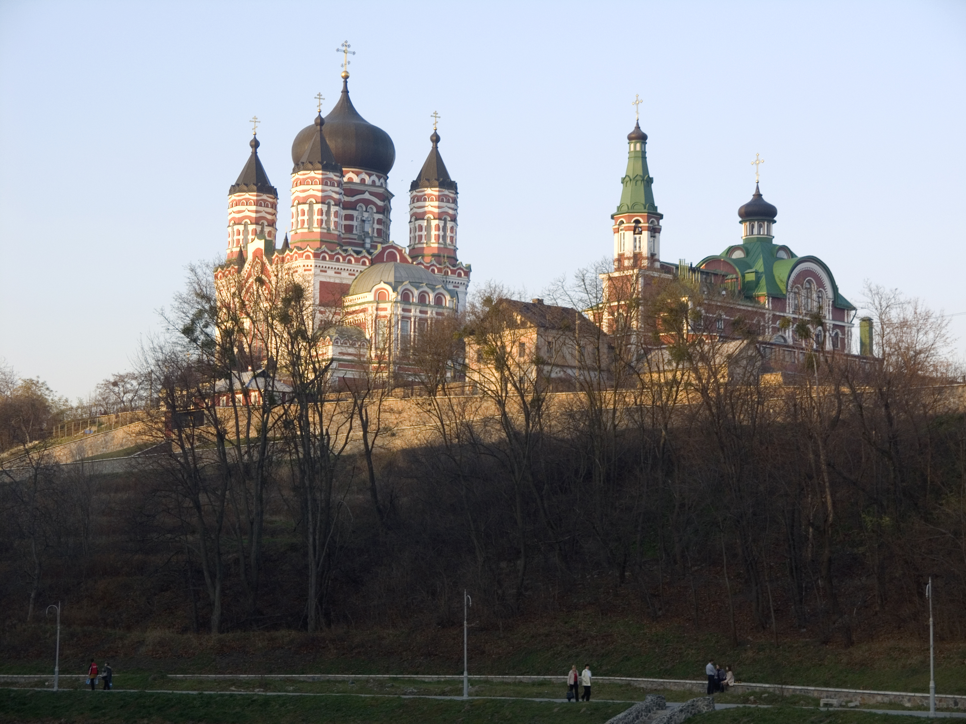 Свято-Пантелеймонівський жіночий монастир. Київ, вул. Академіка Лебедєва, 19.